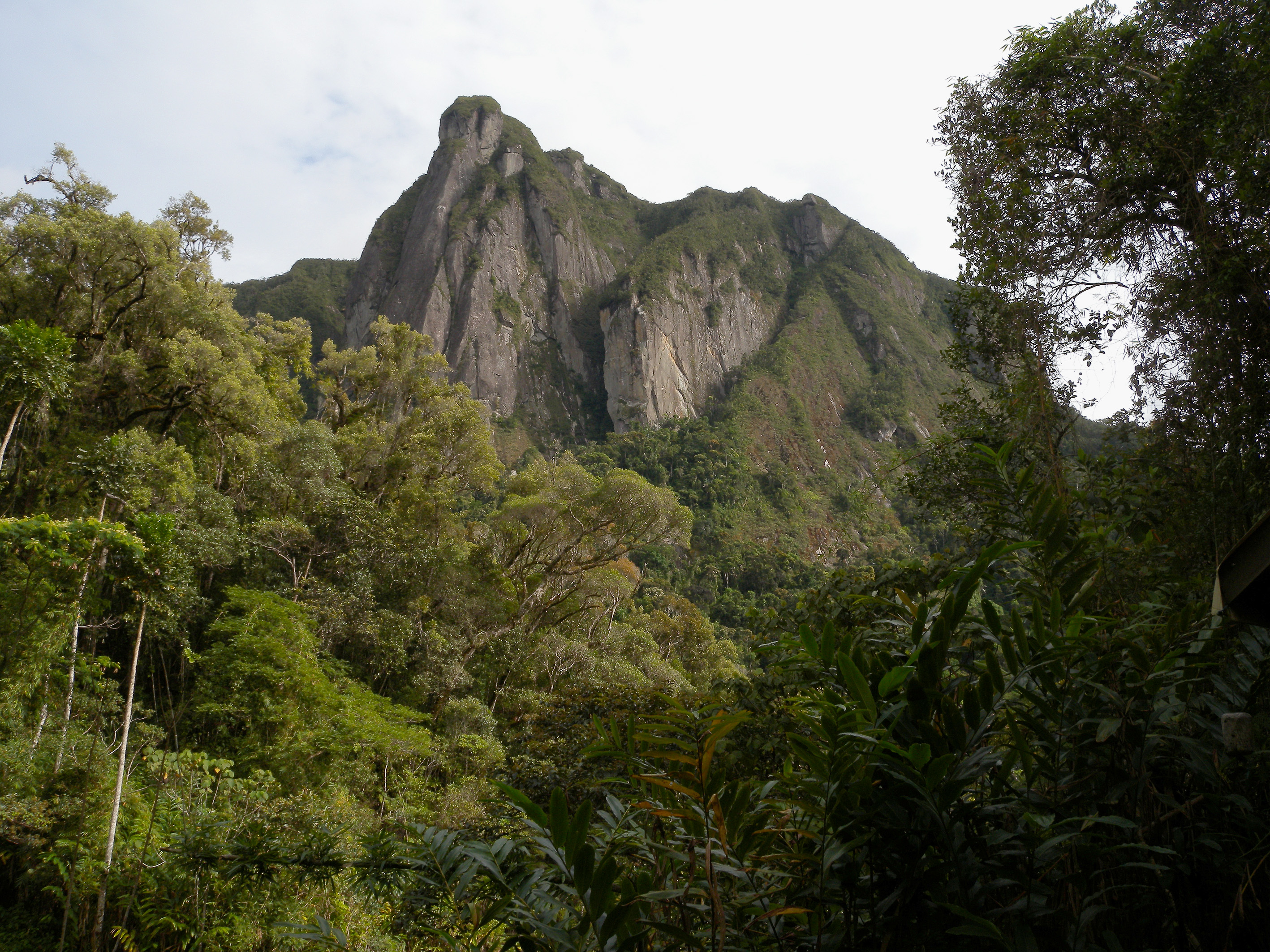 Marojejy National Park, Madagascar